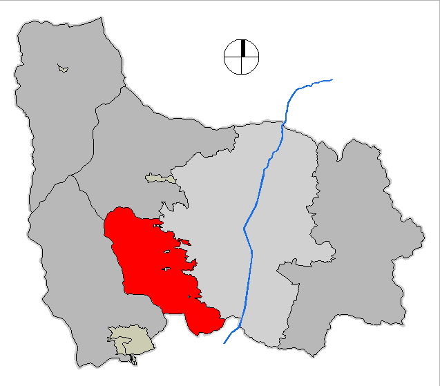 mapa del Corregimiento de Altavista. Medellín, Colombia.